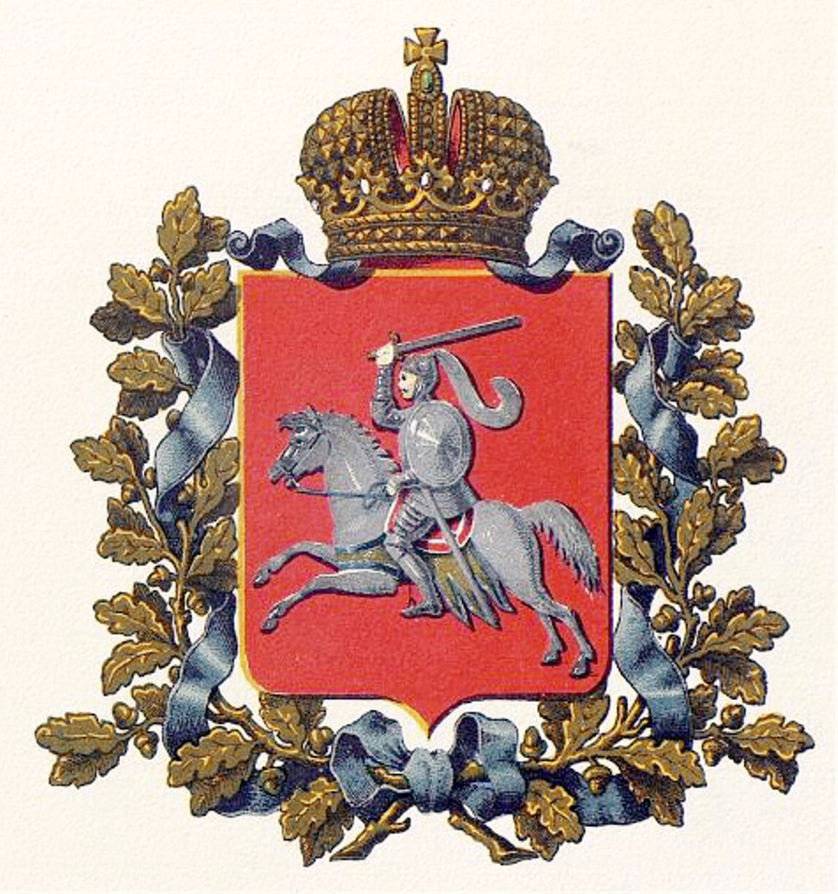 Official Russian Empire coat of arms Vitebsk Governorate. Герб Российской Империи Витебской губернии в Гербовнике Бенке. Утверждён Императором Всероссийским Александром Вторым.